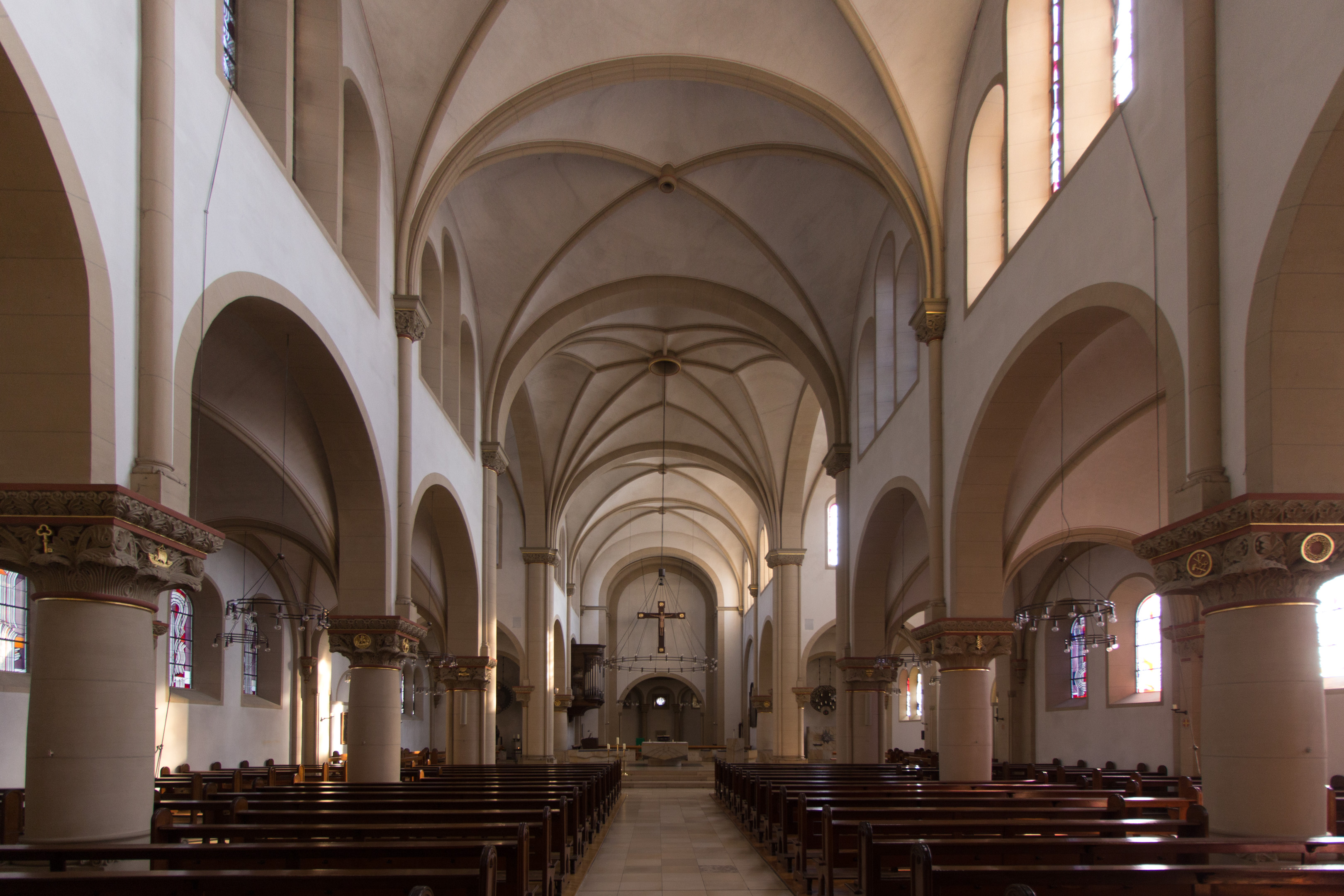 Recklinghausen, Pauluskirche, InnenansichtThis is a photograph of an architectural monument., no. 42